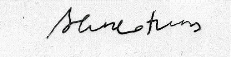 Подпись В.А. Соковнина переведена С. Соковниным с оригинала в уголовном деле на обёртку от сигарет шариковой ручкой